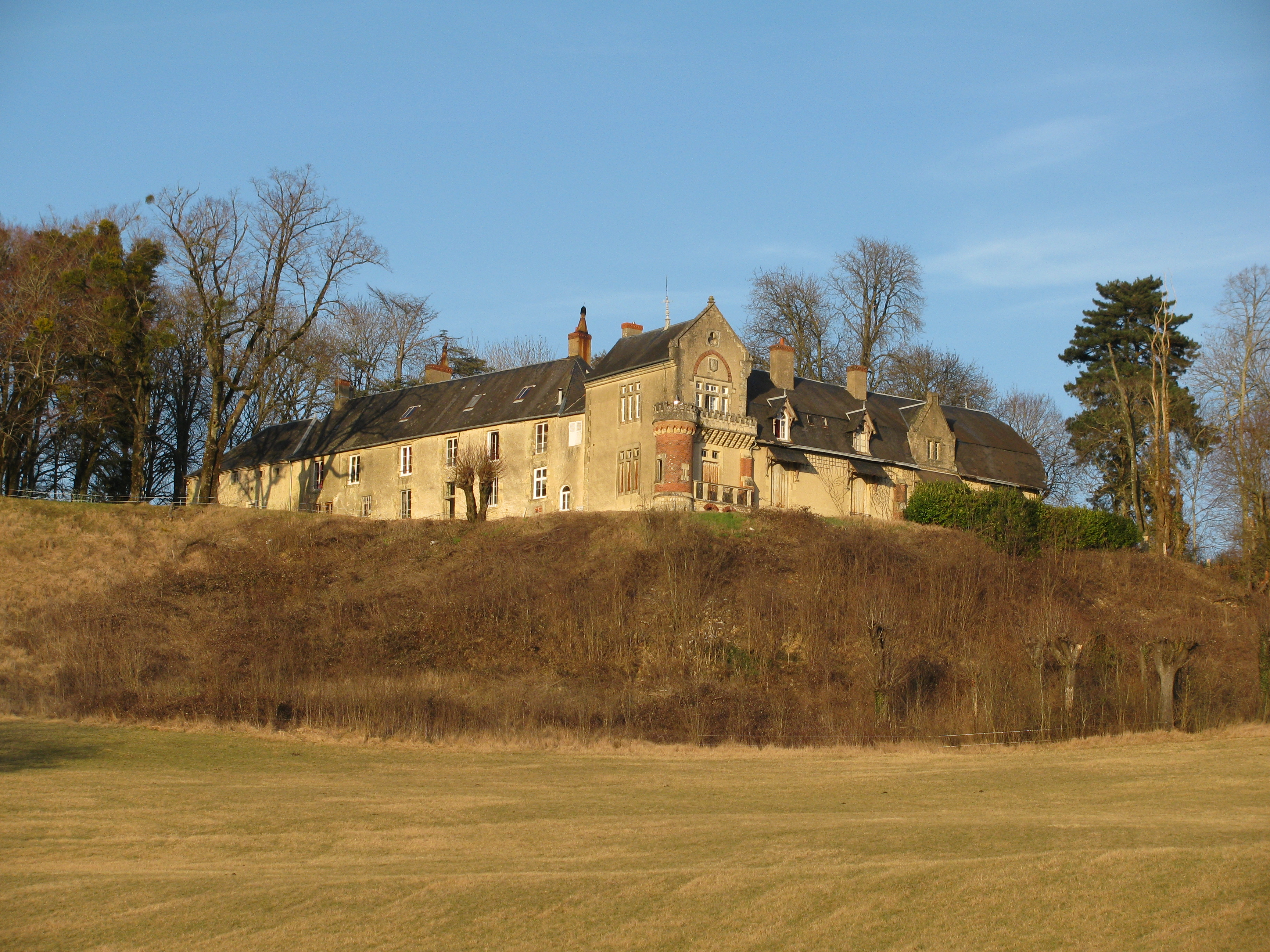 Le château de Mimont, à Parigny-les-Vaux, Nièvre, France